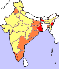 Kartorna bygger på resultat i senaste delstatsval (Juni 2004). Rött betyder att partiet deltar i delstatsregeringen, orange att partiet vann mandat i senaste delstatsvalet och gult att partiet hade lanserat kandidater men utan att vinna mandat. Kartorna tar inte hänsyn till avhopp, partifusioner och fyllnadsval under den ordinarie mandatperiodens gång.